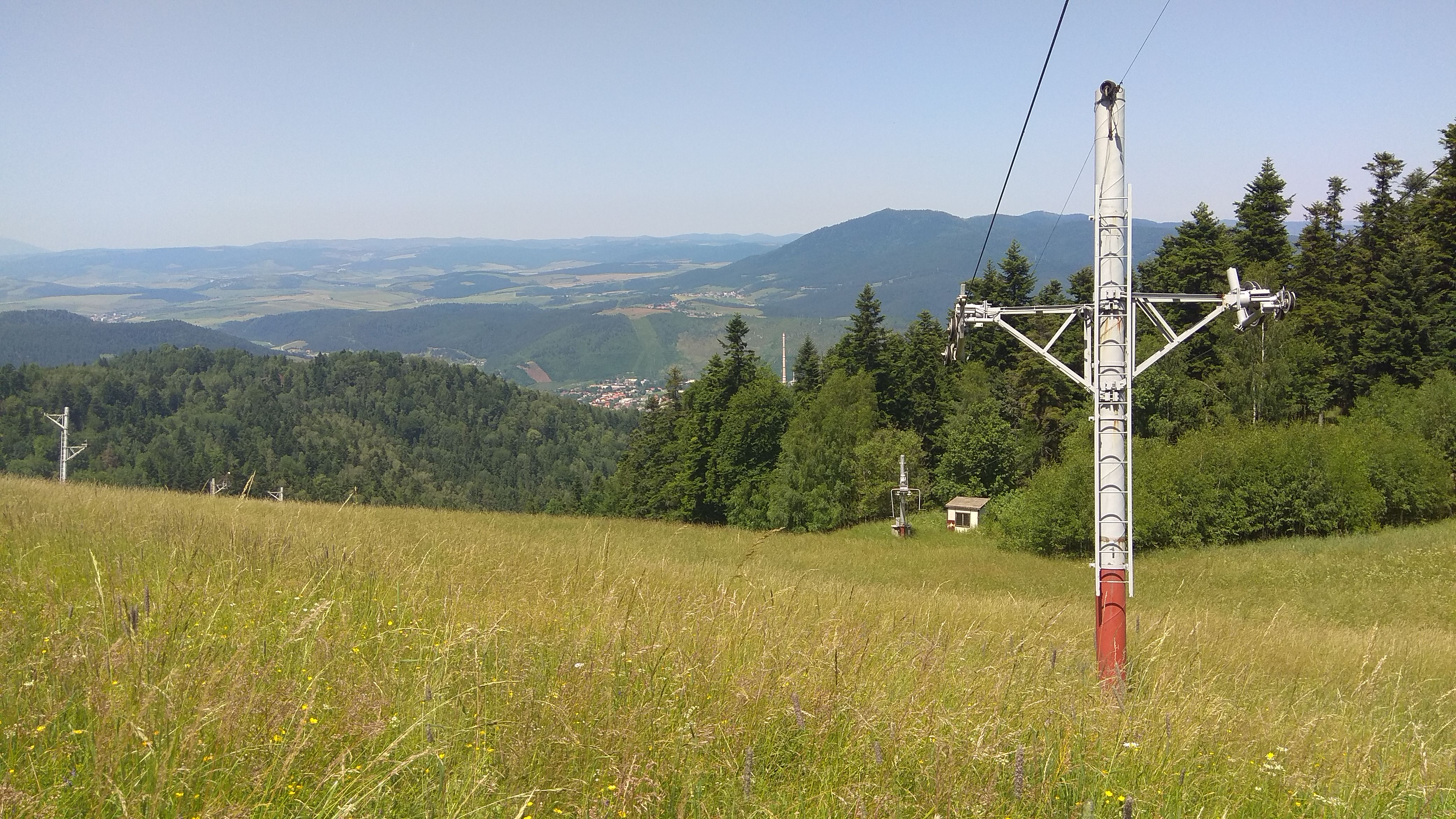 Plejsy spod vrchnej stanice (912 m n.m.). Na zábere vpravo Sľubica, tretí najvyšší vrch pohoria Branisko.